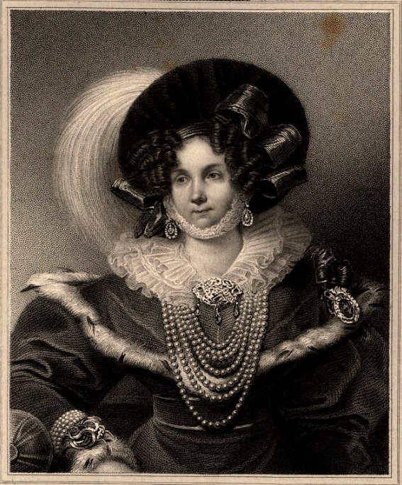 Friederike von Mecklenburg-Strelitz